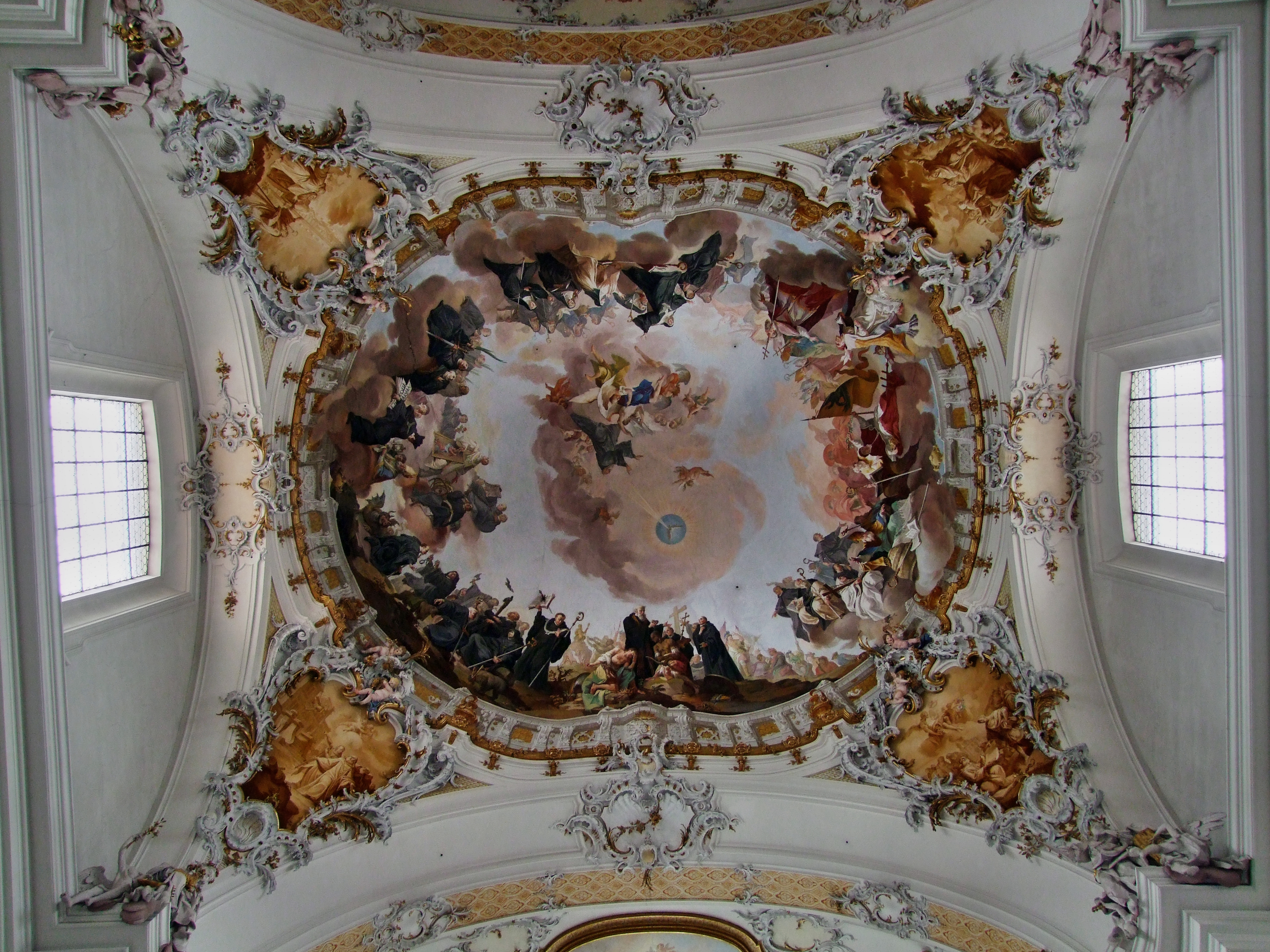 Glorie des Hl. Benedikt und seines Ordens - Fresko der Langhauskuppel (F38), Basilika Ottobeuren